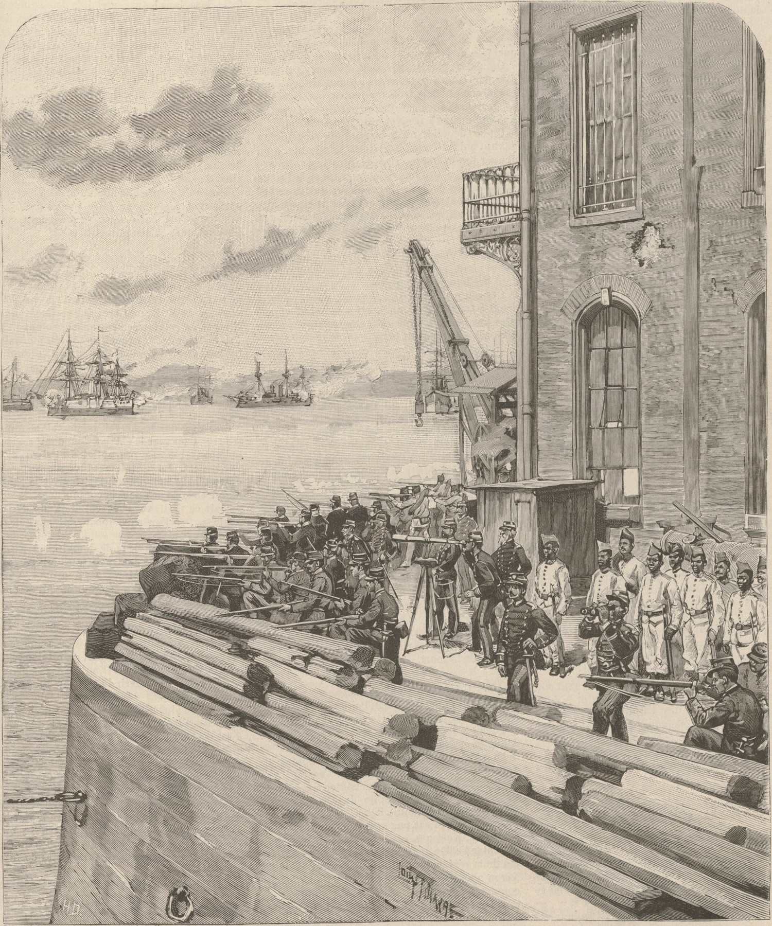 BRÉSIL. — La guerre civile a Rio de Janeiro. — Un combat aux fortifications de la Mortena, a la Gamboa. — (Dessin de M. L. Tinayre, d'après les documents communiqués par M. R...).